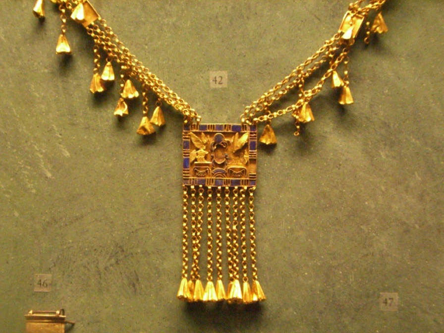 Pectoral au nom du pharaon et grand prêtre d'Amon Pinedjem - XXIe dynastie égyptienne - Musée du Louvre